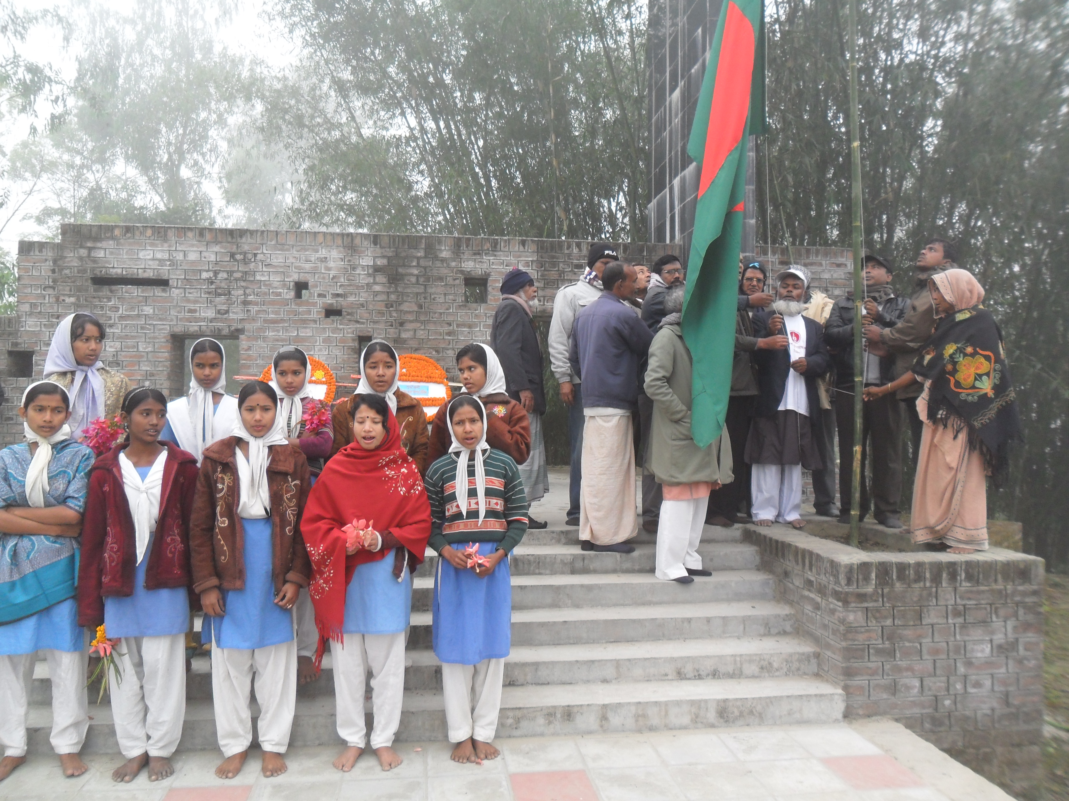 বালাপাড়া গণকবরে পতাকা উত্তোলন